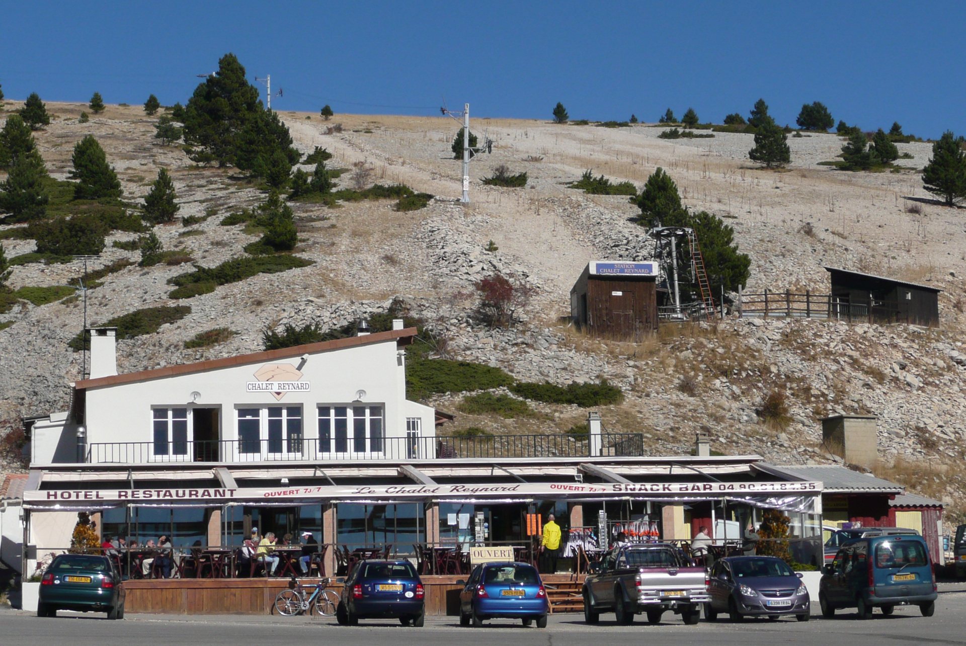 Mont Ventoux par Bédoin, Châlet Reynard